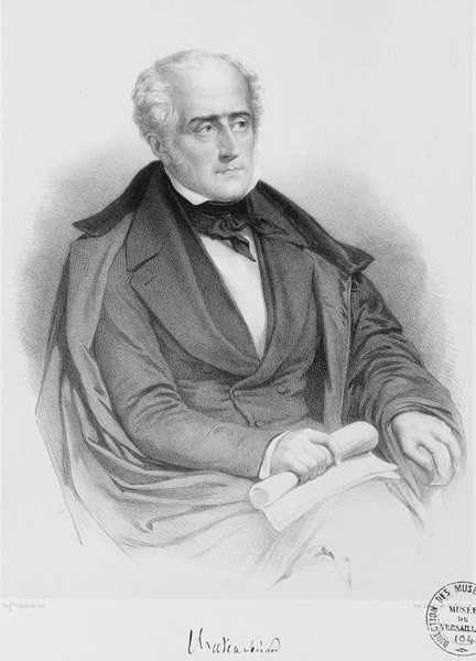 Vicomte René-François de Chateaubriand (1768-1848)